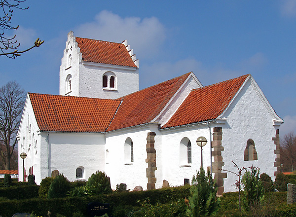 Vejlby Kirke Århus Amt, Denmark